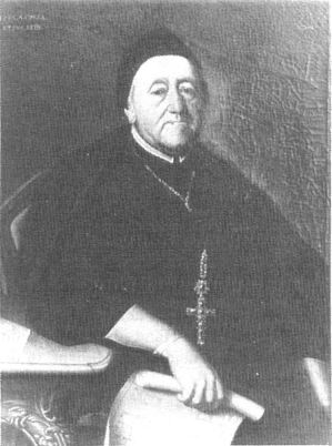 Jacob Pach (1711-1791) war der letzte Abt des Stiftes Kleinmariazell